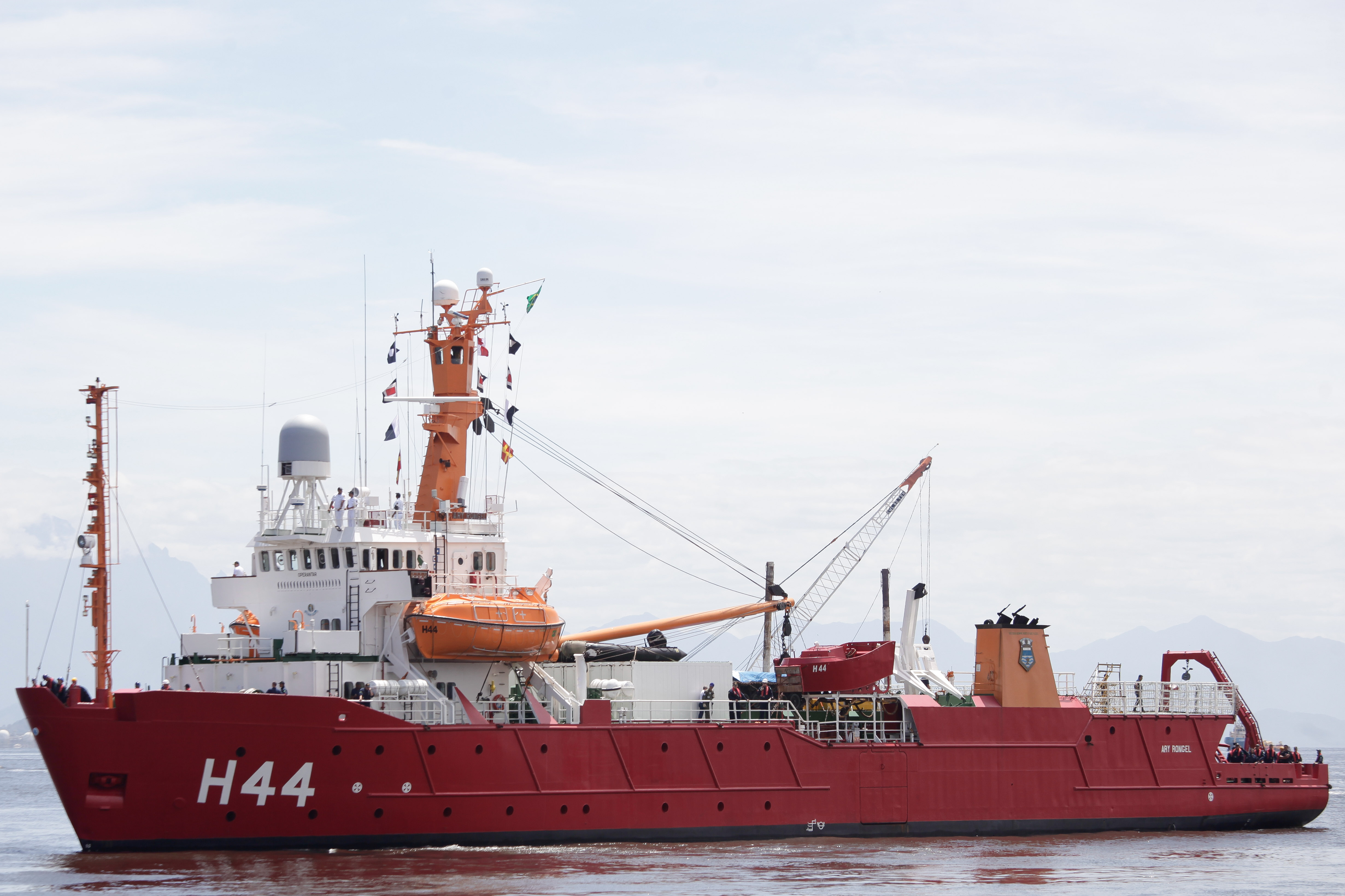 06/10/2014, Niterói - RJ Fotos: Felipe Barra